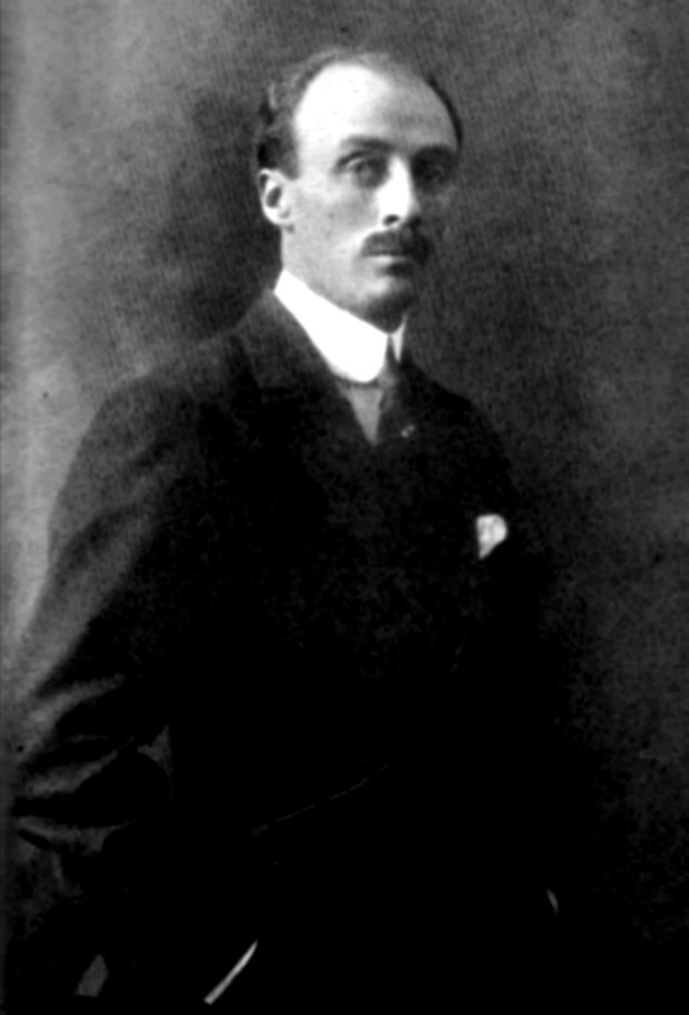 Retrato